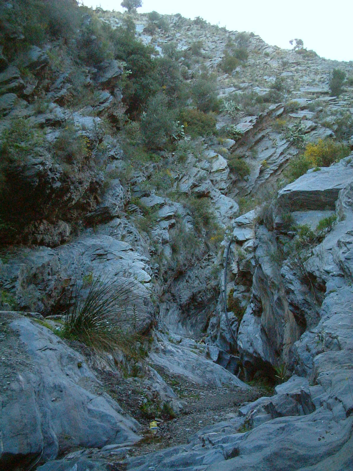 Estrechura de Guainos